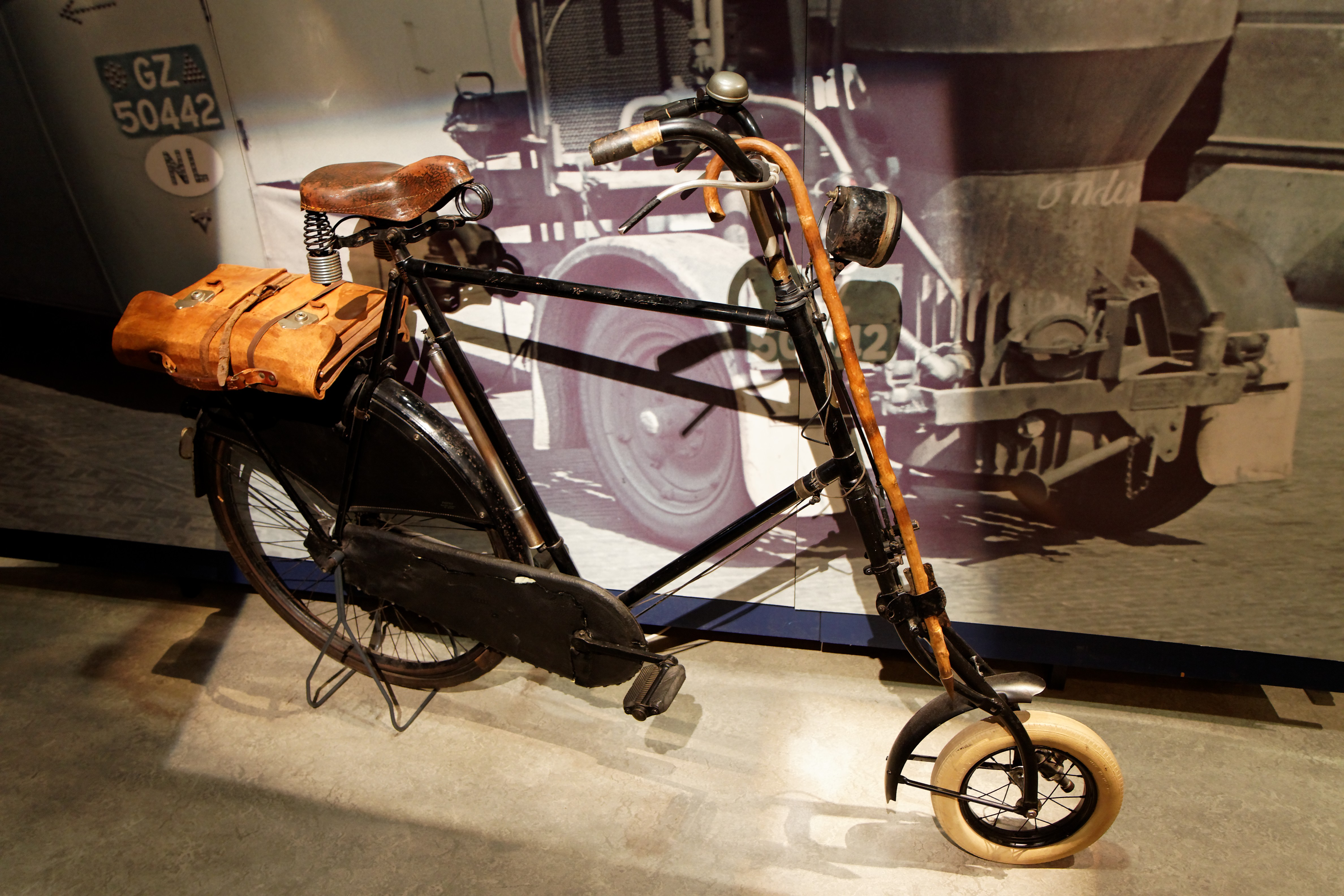 090626-115414_ 1691_50D_raw